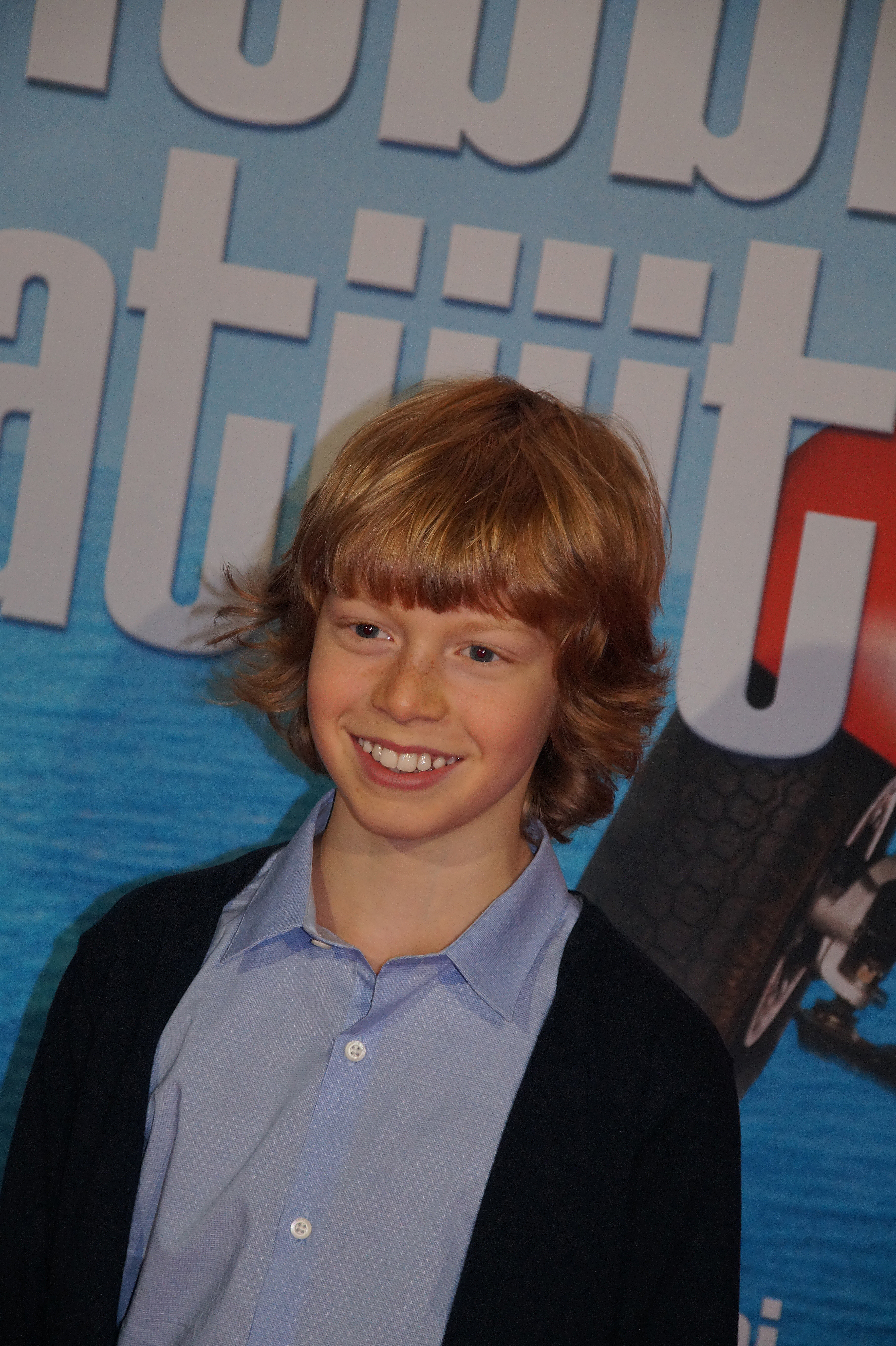 Arsseni Bultmann bei der Premiere von 'Robbi, Tobbi und das Fliewatüüt', Köln (2016).